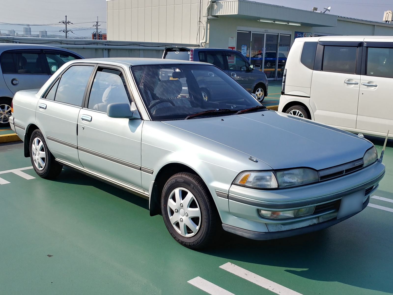 カリーナ 1.8SEエクストラ（後期型）